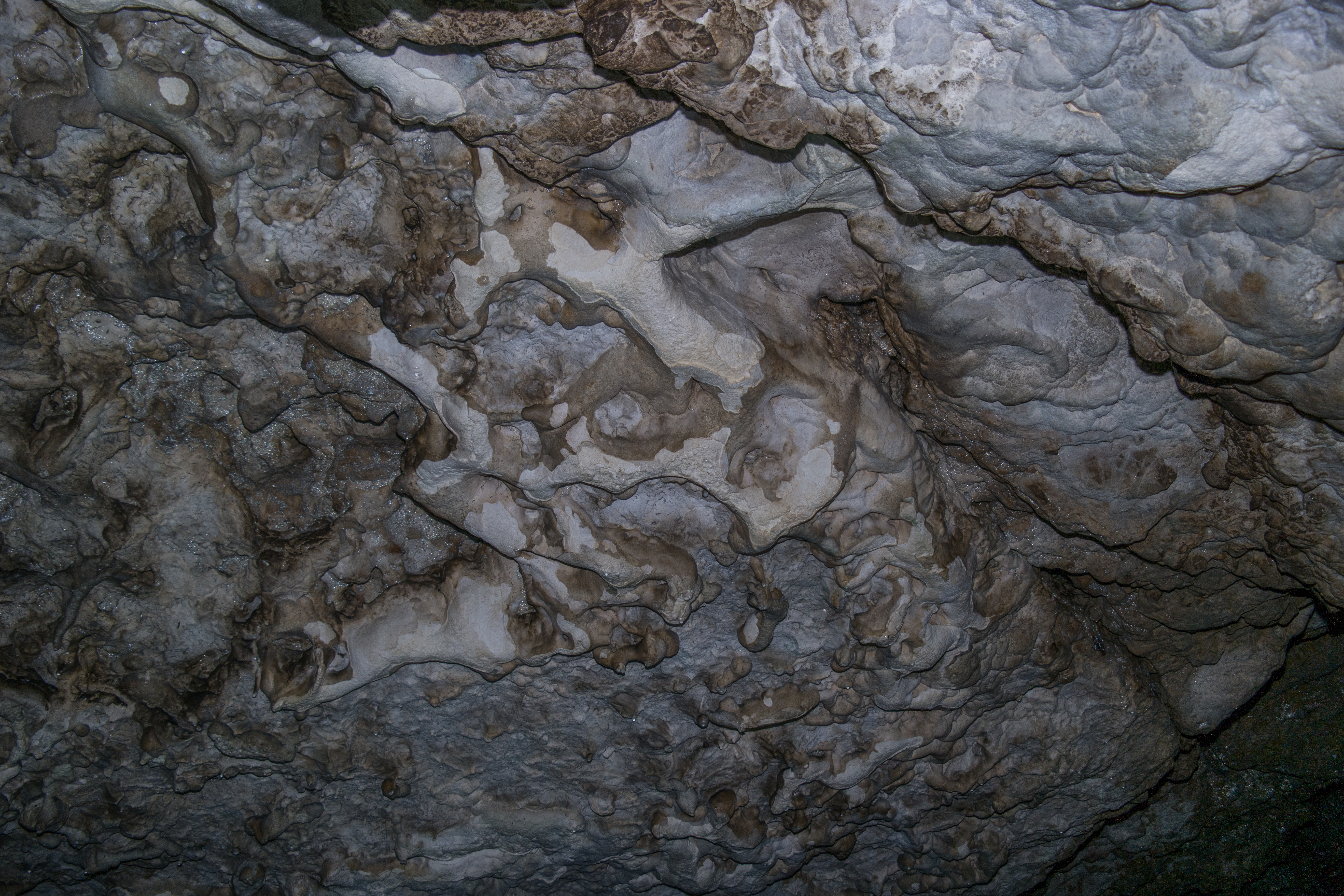 Sinterschmuck an der Höhlendecke